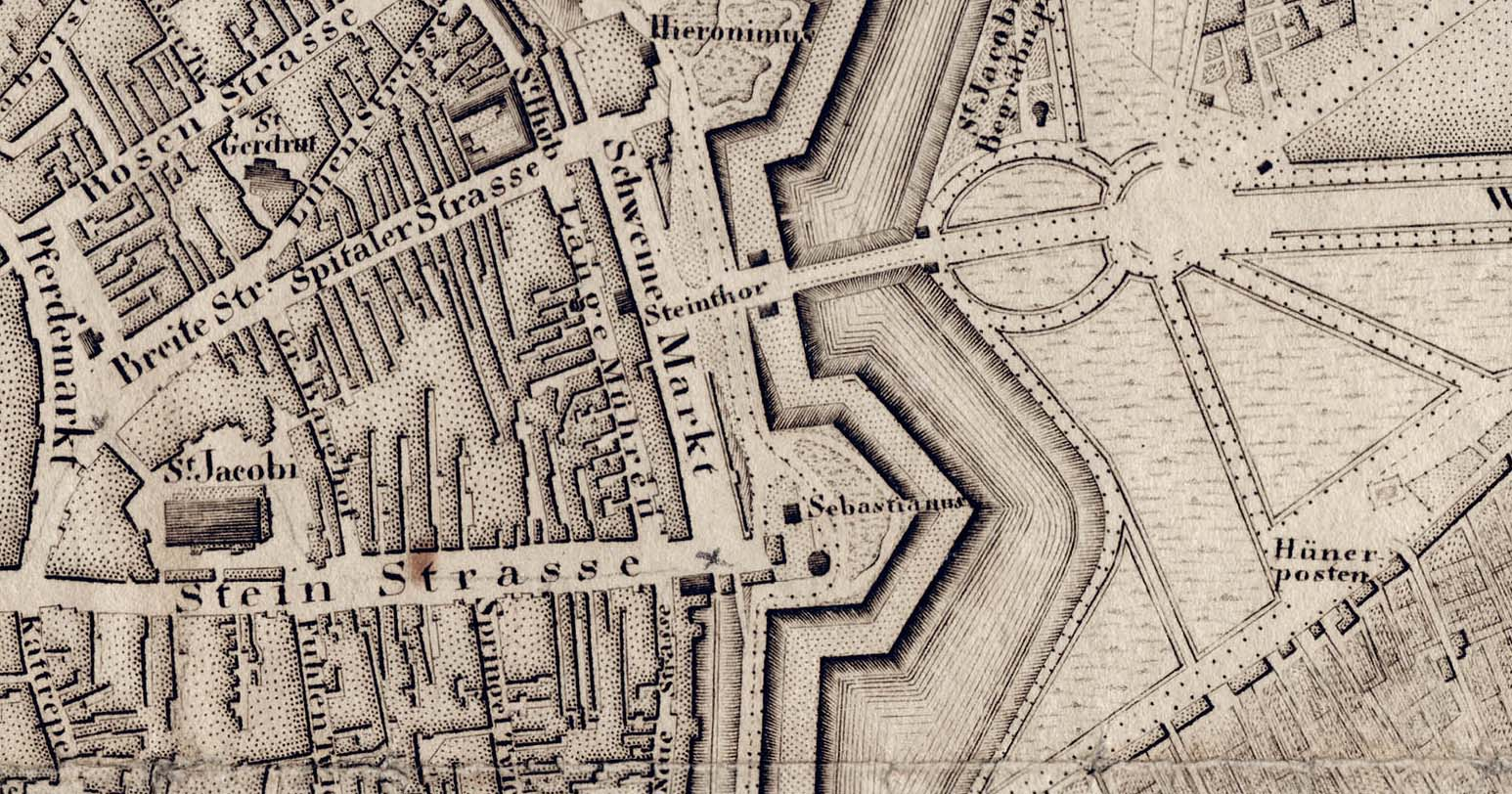 Kartenausschnitt Hamburg 1810